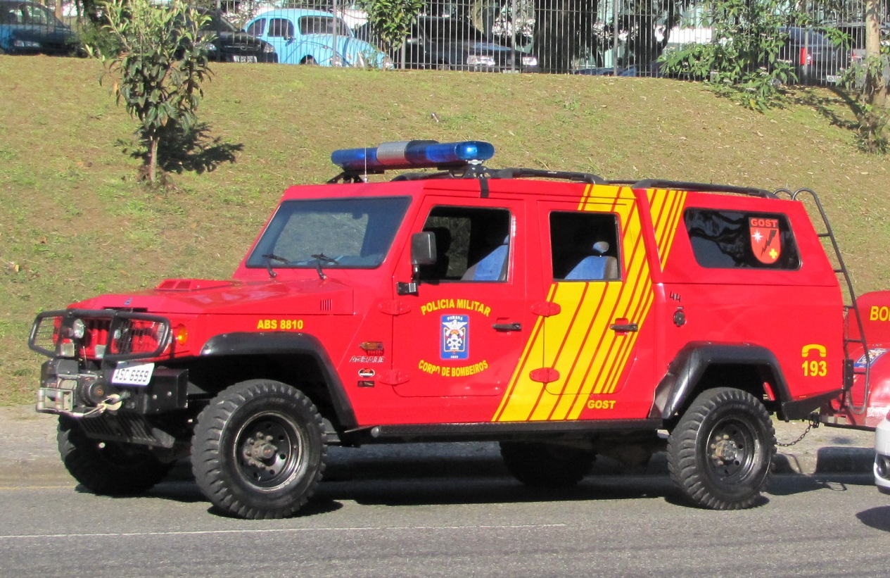 Viatura de Busca e Salvamento do Corpo de Bombeiros do Paraná.